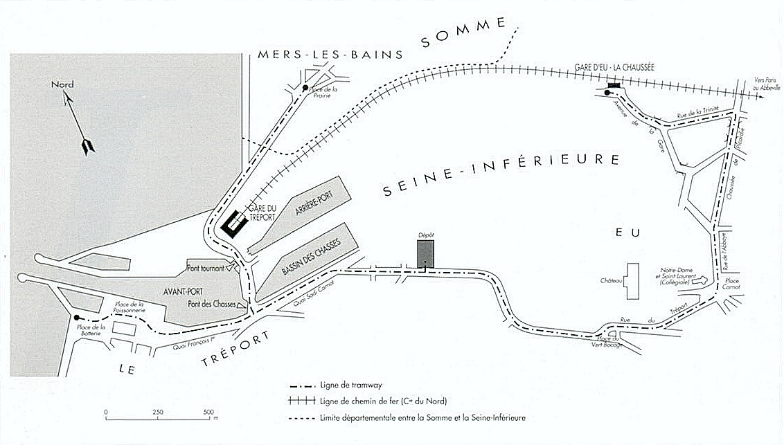 Plan du tramway d'Eu-Le Tréport